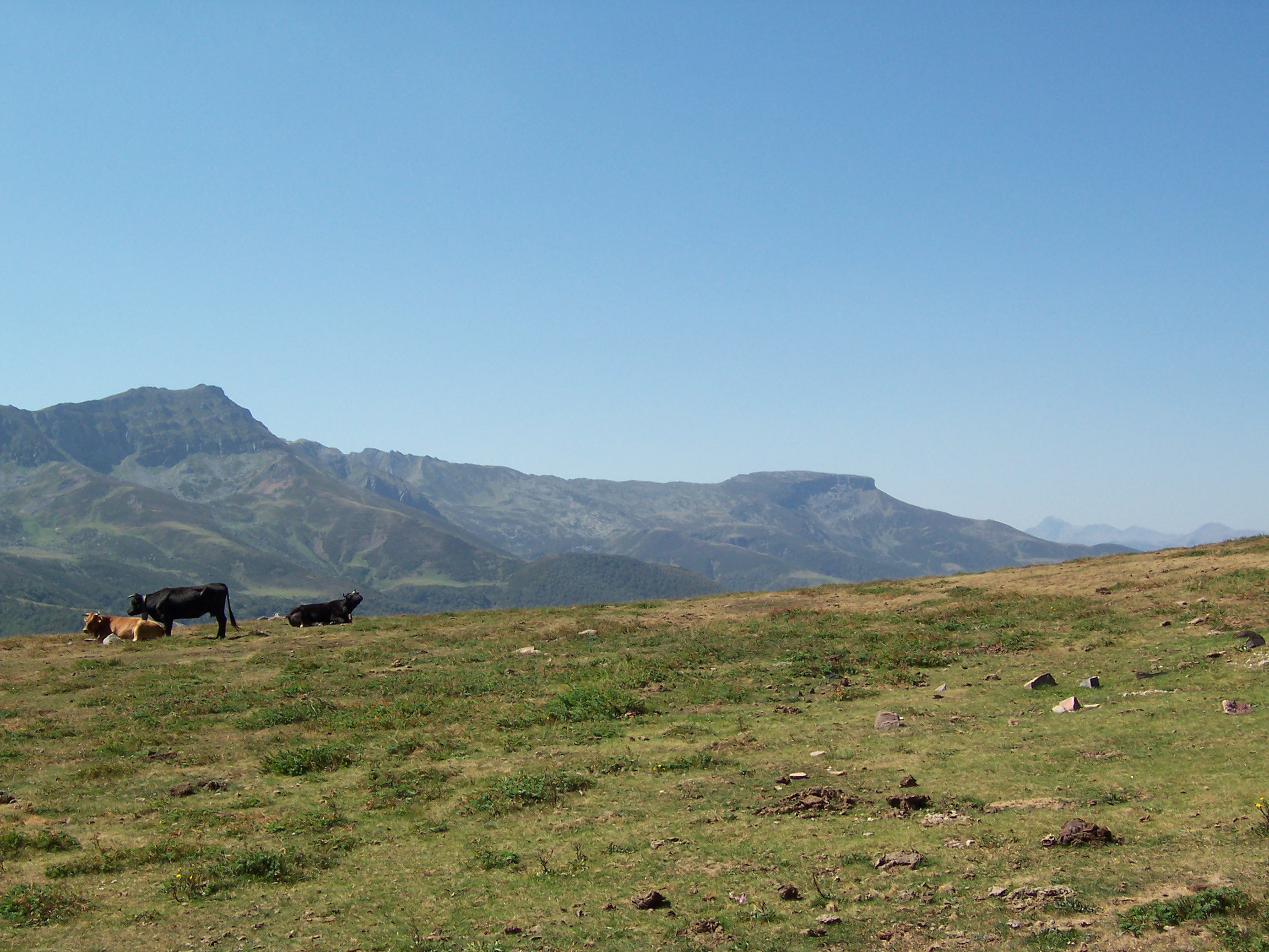 Siera de Isar y Peña Labra